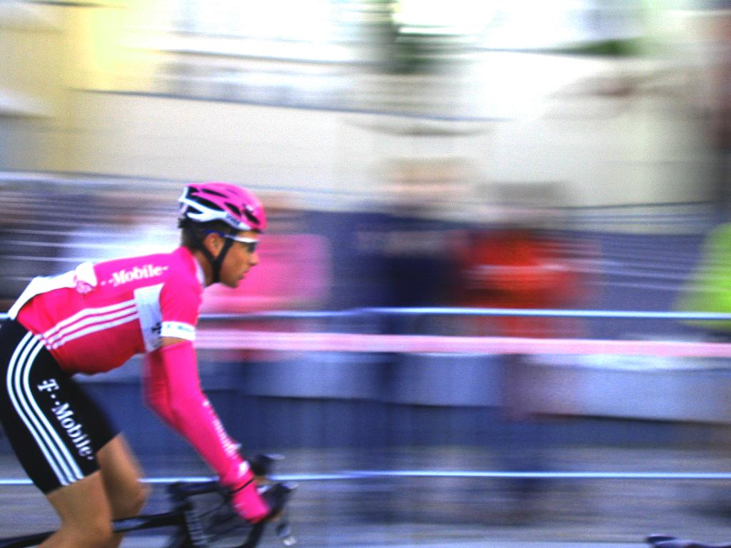 Patrik Sinkewitz